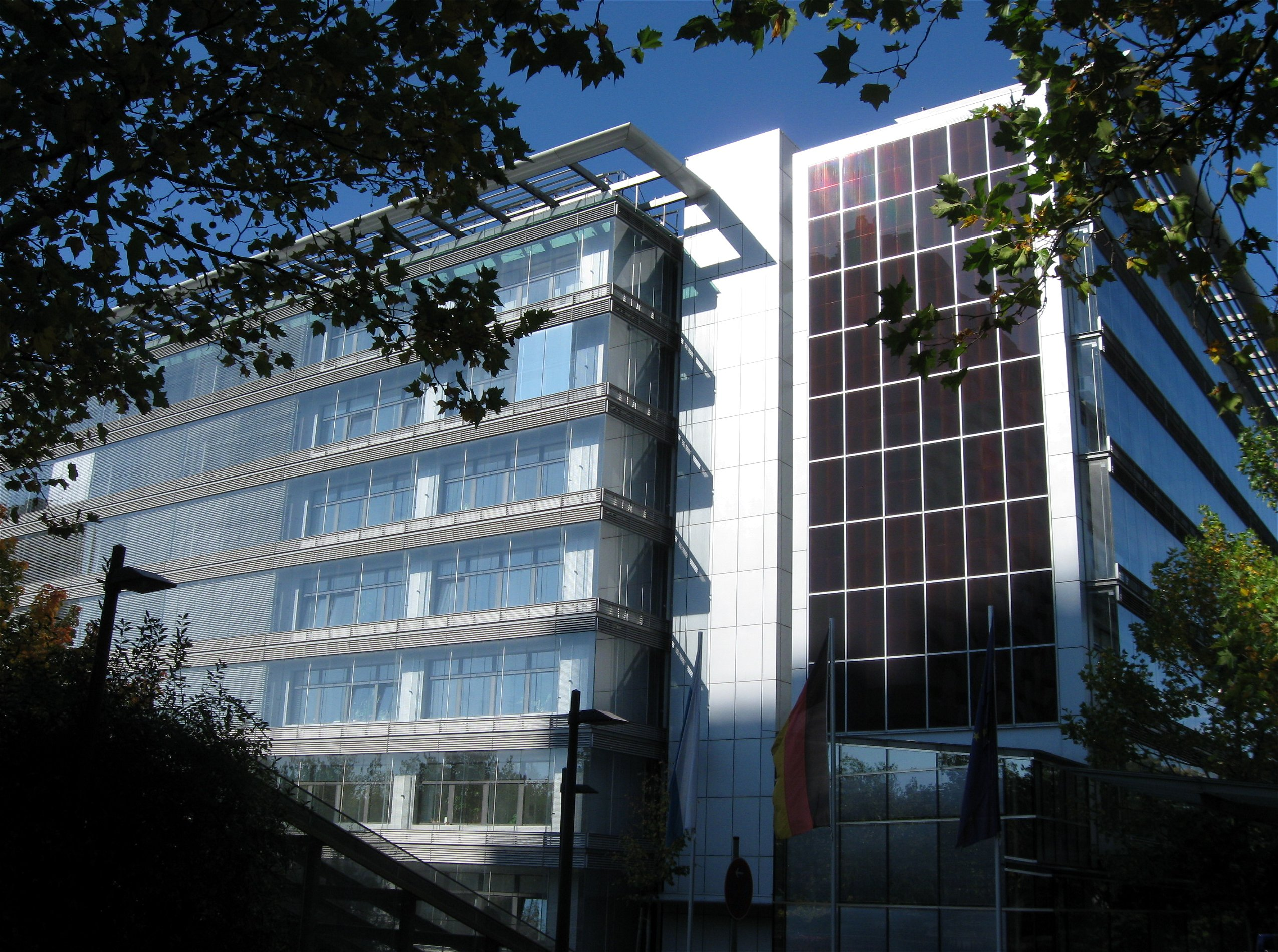 Bayerisches Staatsministerium für Umwelt und Gesundheit, Rosenkavalierplatz 2, München-Bogenhausen